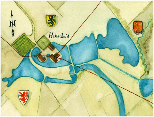 Hebscheid - ein Weiherhaus umgeben von Wassergräben und Teichen. Im Wohnturm treffen die Territorien LIMBURG (WSW), JÜLICH (NNO) und KORNELIMÜNSTER (OSO) zusammen. Vor der Schildmauer (Blick NW) der quadratisch angelegte Gemüsegarten sowie links davon der Obstgarten. Das Bild ist ein Aquarell nach Vorlage der Tranchot-Karte aus 1807.